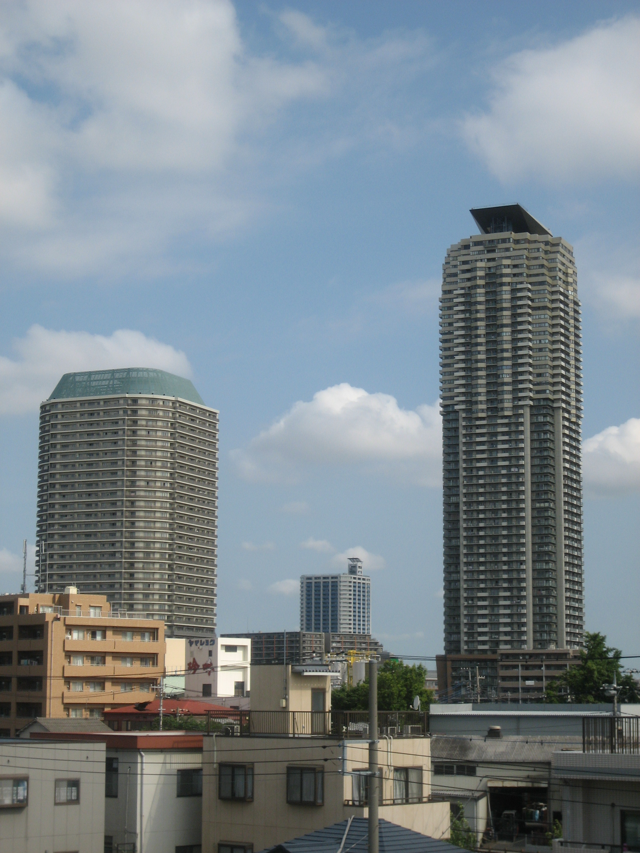 エルザタワー55とエルザタワー32